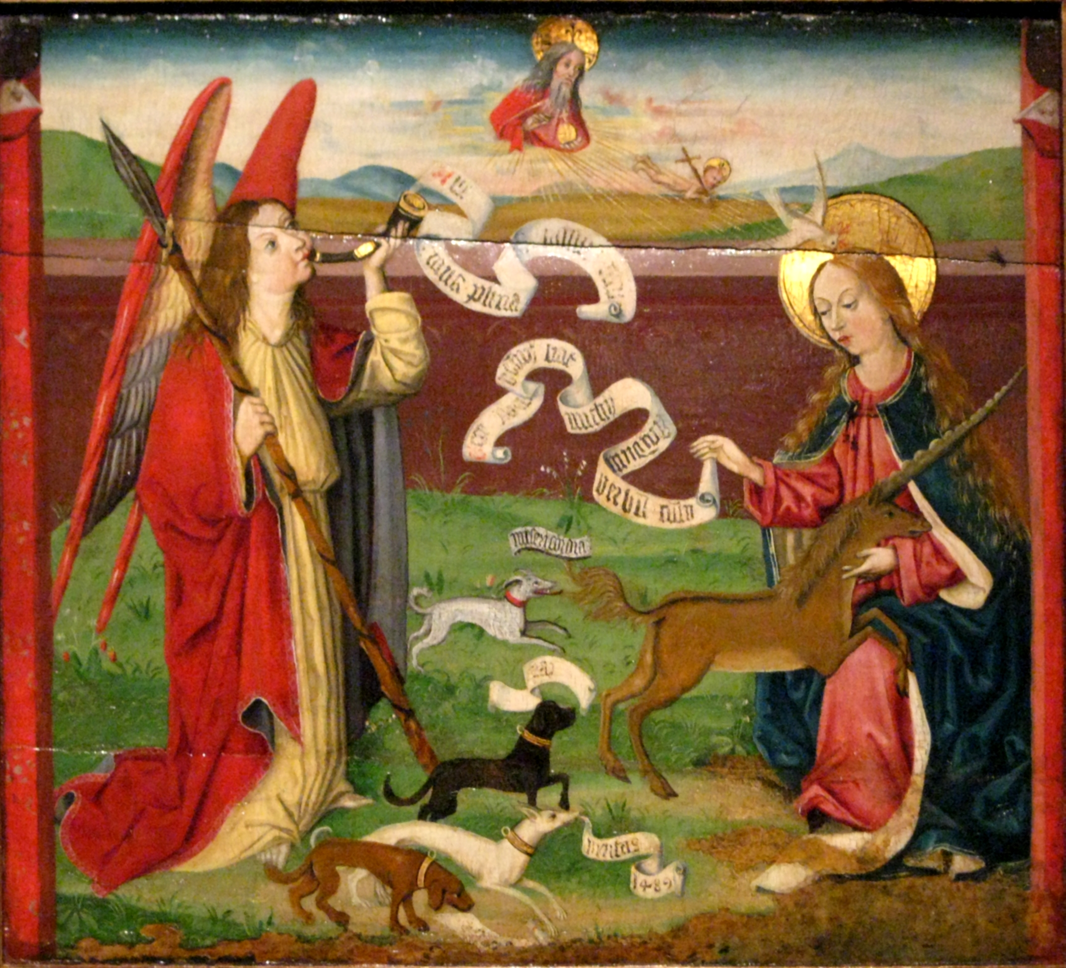 Сцена Благовещения имеет очень редкую иконографию, в нее добавлена сцена Мистической охоты на единорога. Архангел Гавриил уподобляется трубящему в рог охотницу с собаками, преследующему единорога, который находит заступничество у Богоматери. Согласно легенде, поймать единорога охотники могут только тогда, когда он утратит свою изворотливость и силу перед чистотой Девы Марии. Подобно тому, как Христос обретает земное воплощение в лоне Богоматери через Непорочное Зачатие. Дева Мария восхваляется как земное убежище мистического единорога-Христа. Свора собак, сопровождающих архангела Гавриила, персонифицирует христианские добродетели. Одновременно псы могут обозначать монахов доминиканского ордена (домини канес), которые стремятся к милосердию, миру и постижению божественной истины (надписи в бандеролях рядом с ними).